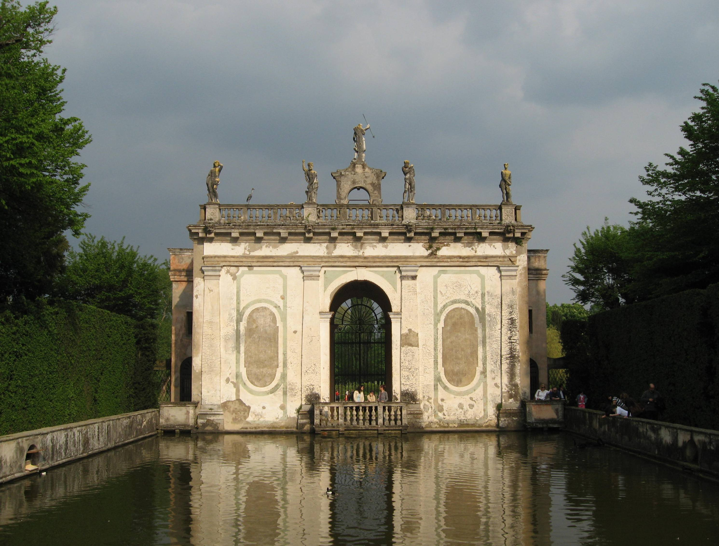 Parco di Valsanzibio: arco di Sileno